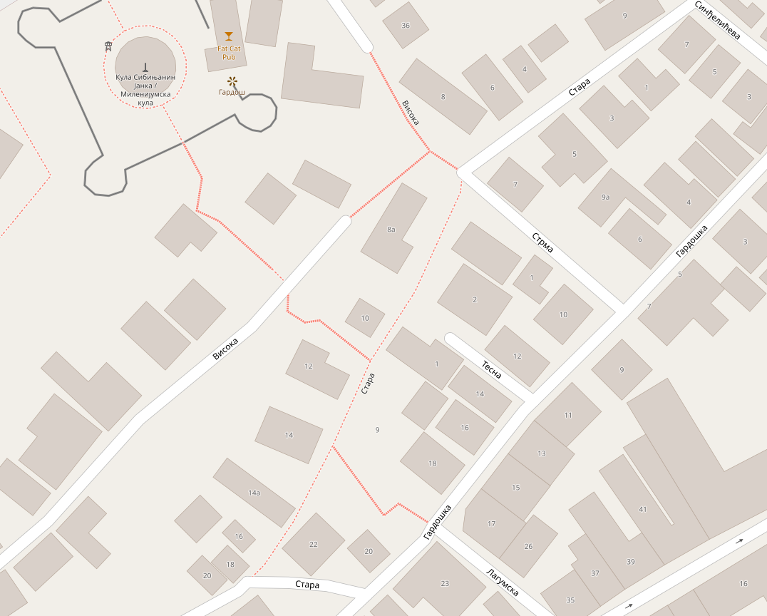 Srpski (latinica): Ulica Tesna u Zemunu na mapi